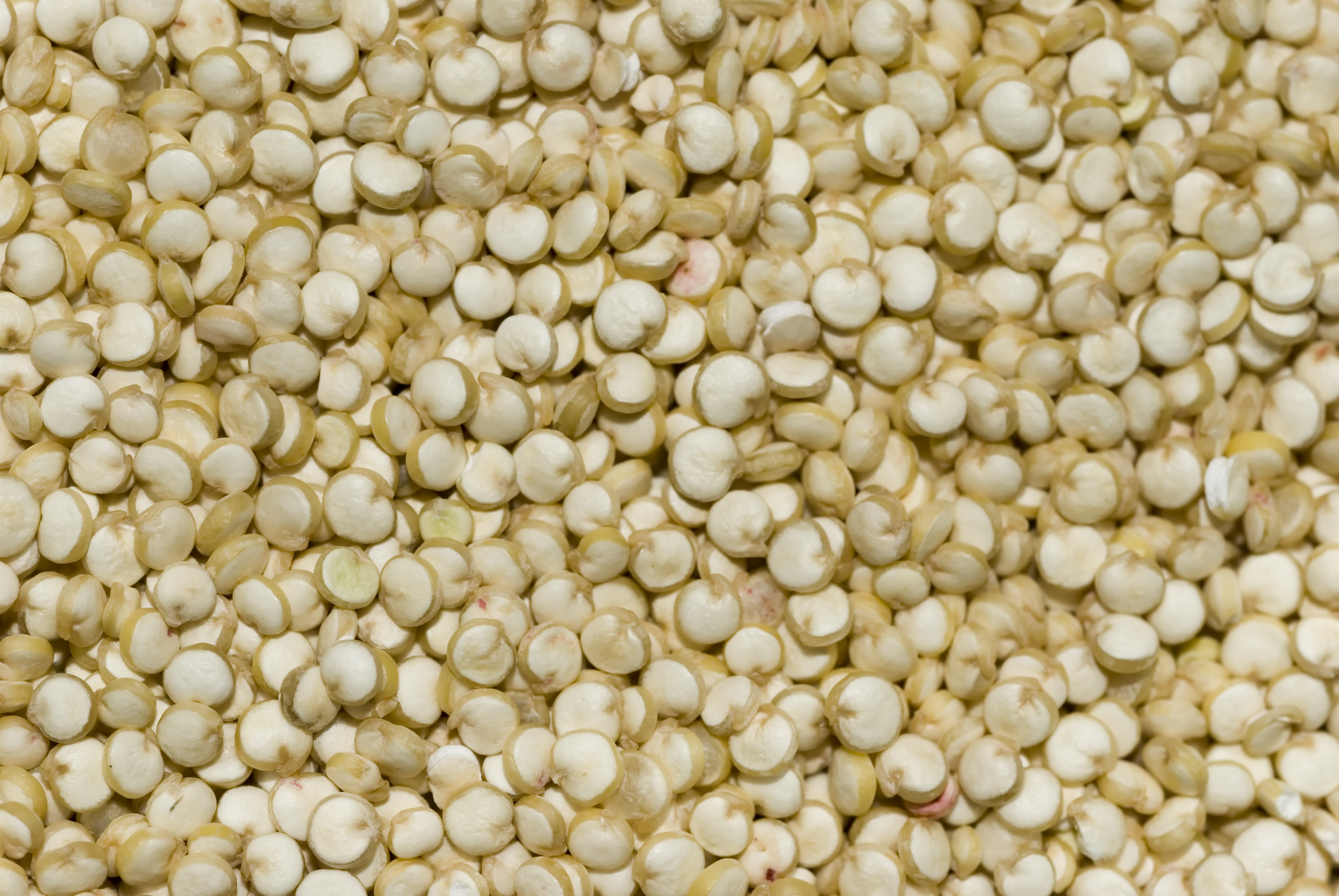 Quinoa